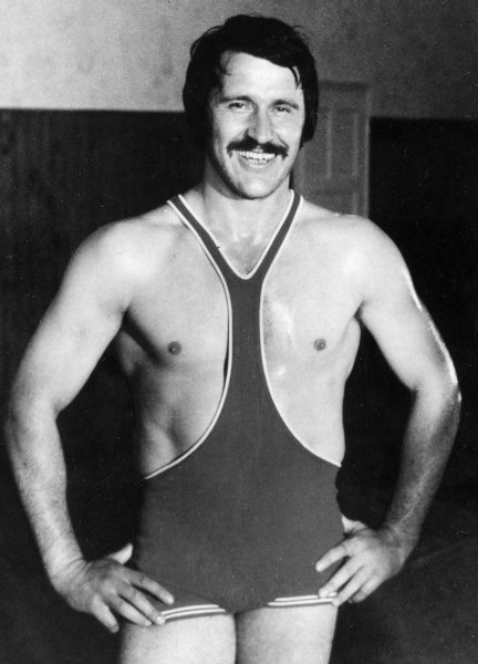 Josip Čorak